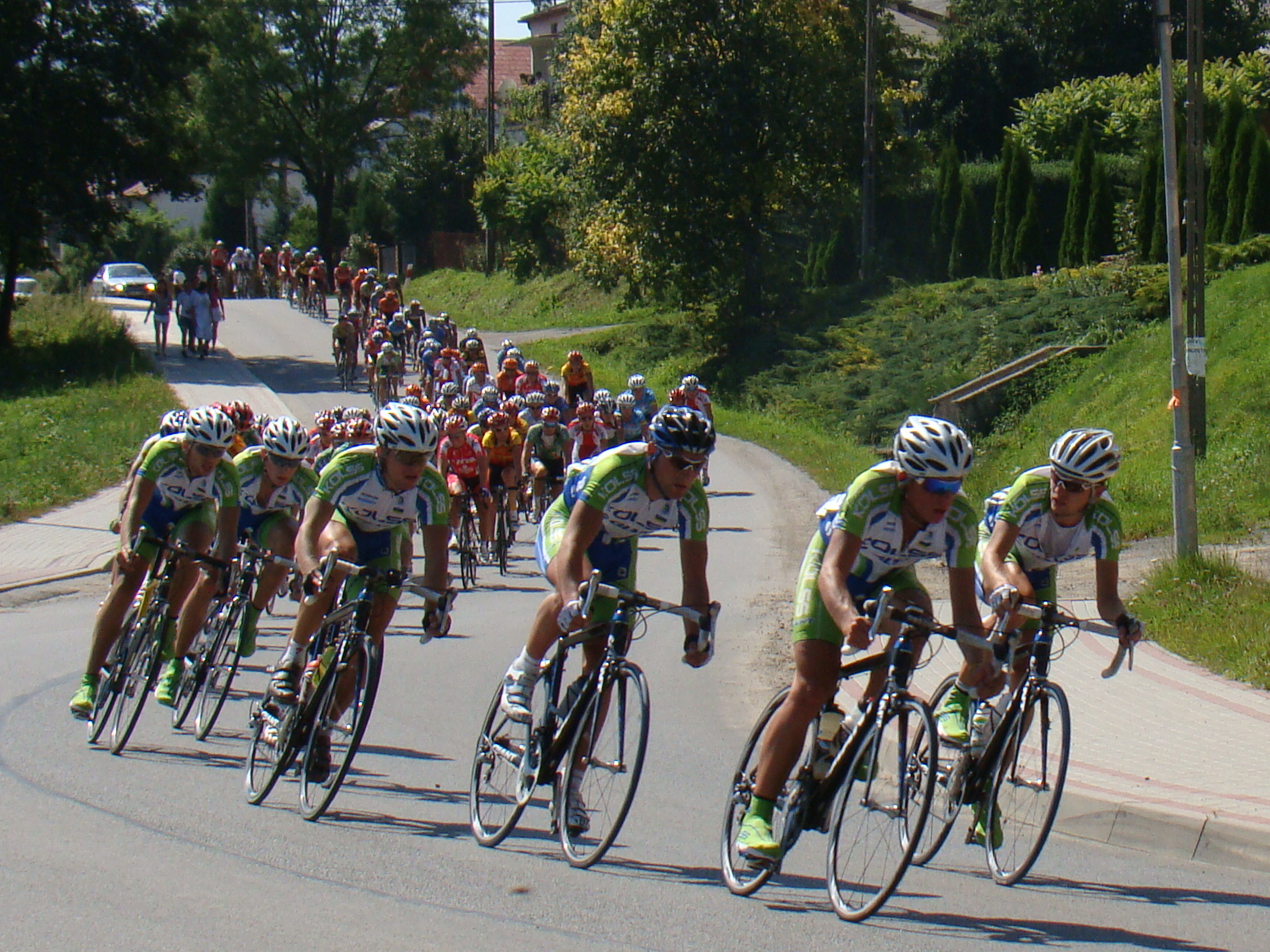 10. Międzynarodowy Wyścig Kolarski o Puchar Uzdrowisk Karpackich. Droga wojewódzka W-889. Bukowsko.